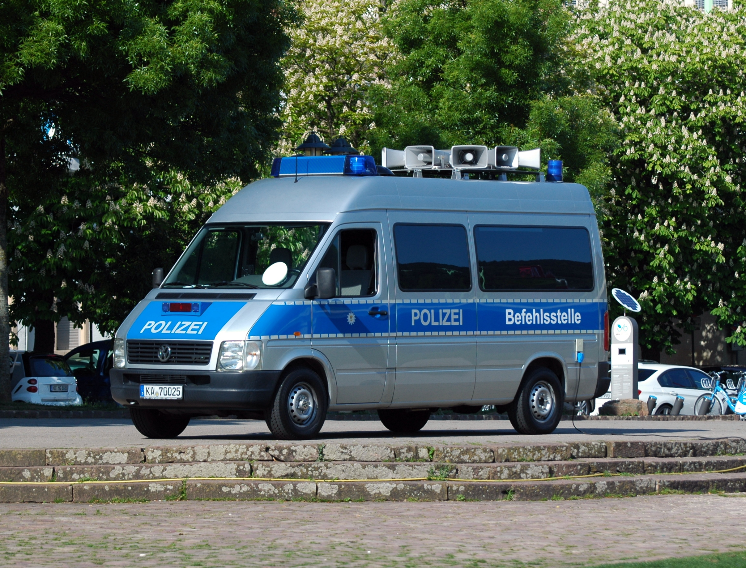 Heidelberg - Volkswagen LT II - Befehlsstelle Polizei - KA 70025